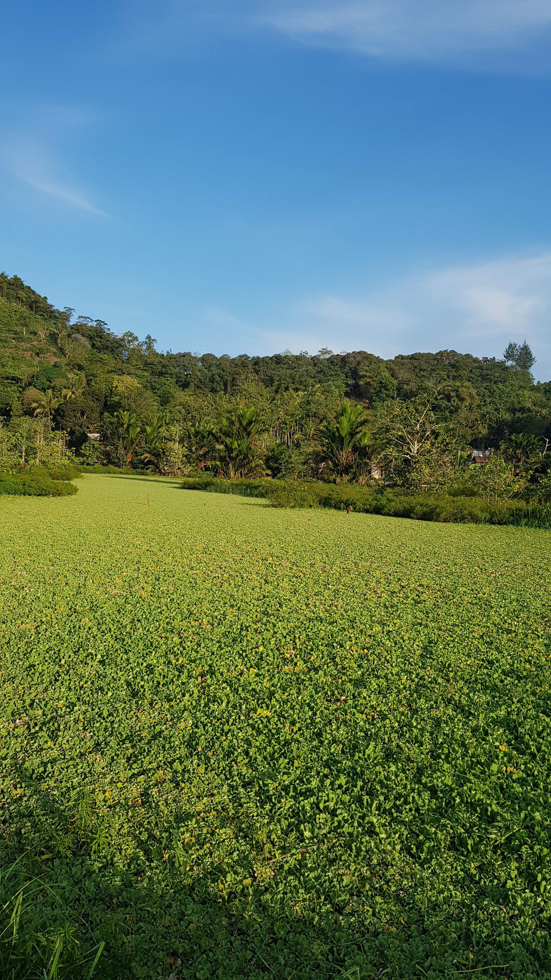 Pemandangan di dekat Gedung Rumah Sakit yang Batal didirikan